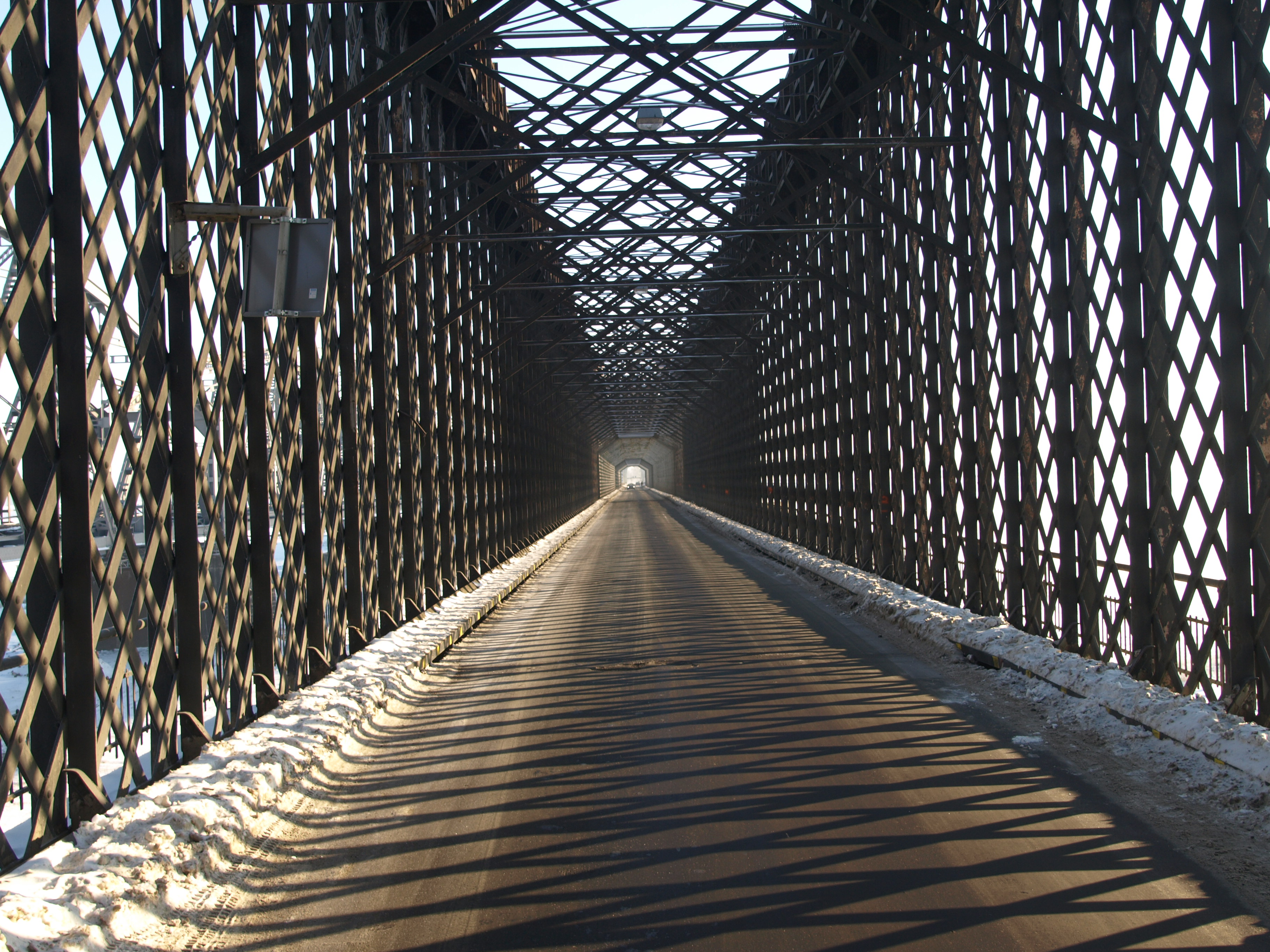 Tczew, most drogowy.